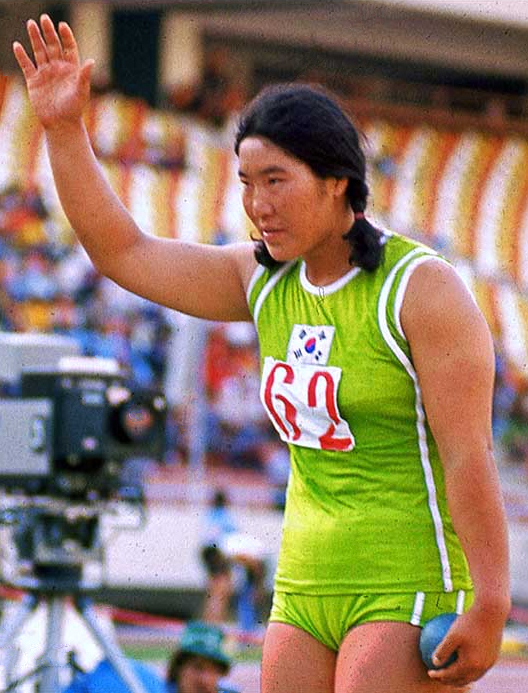 Paik Ok-ja at the 1974 Asian Games in Tehran